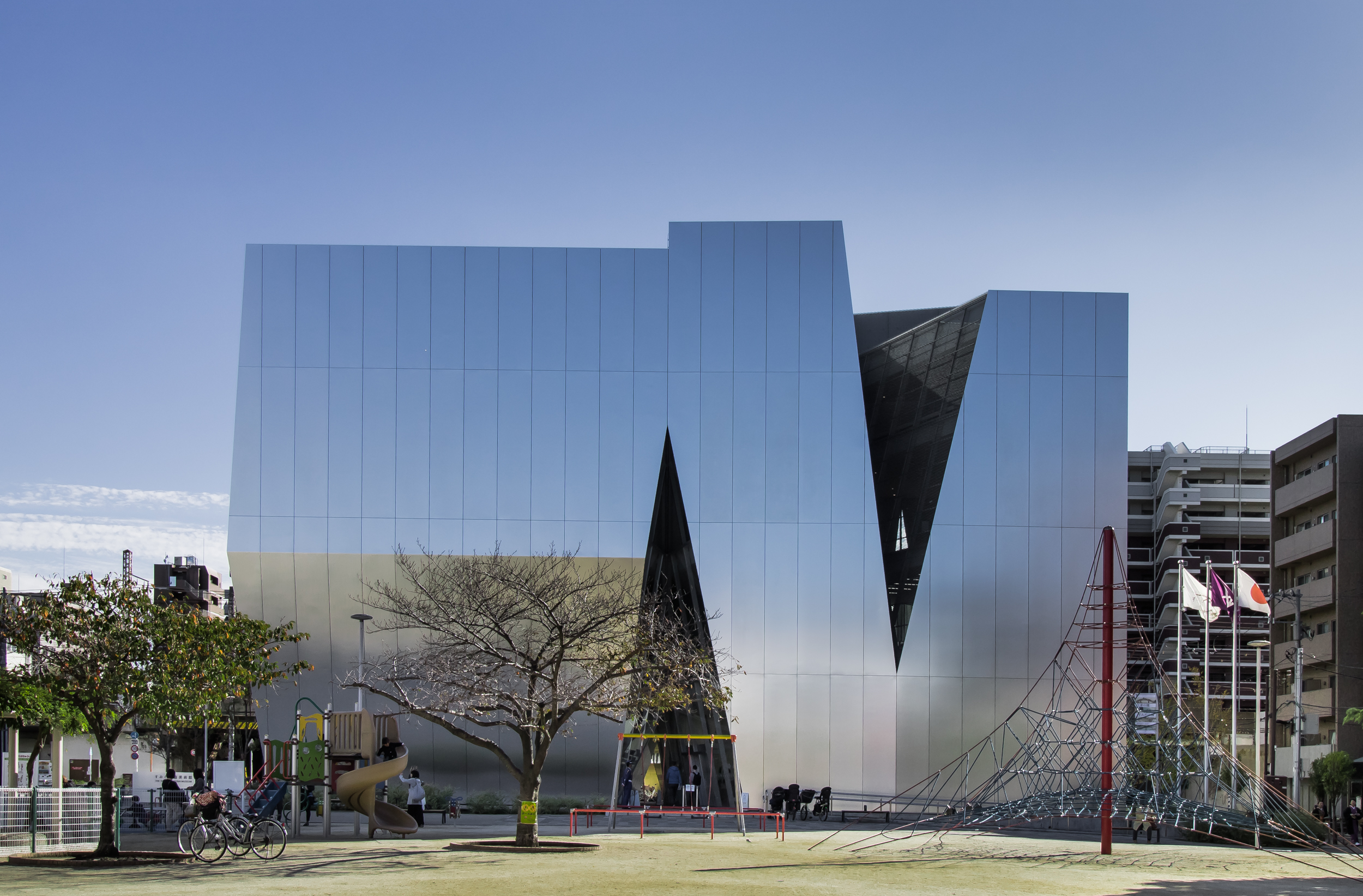 すみだ北斎美術館。妹島和世建築設計事務所（2016）。